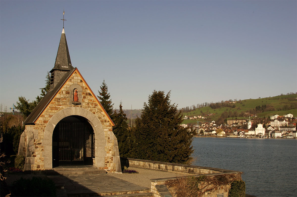 Königin Astrid Kapelle in Küssnacht am Rigi